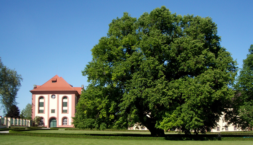 Altshausen, Deutschland: Schloss, Reitschule, vom Schlosshof